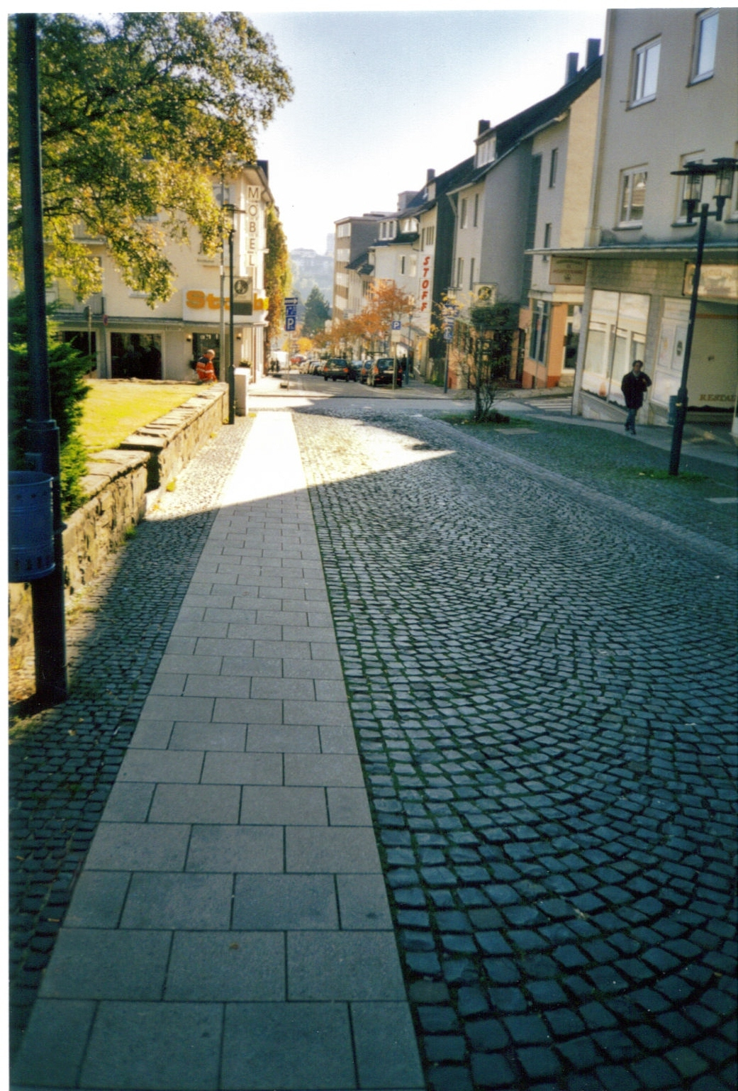 Remscheid,_Ehemalige_Strassenbahnlinie.jpg